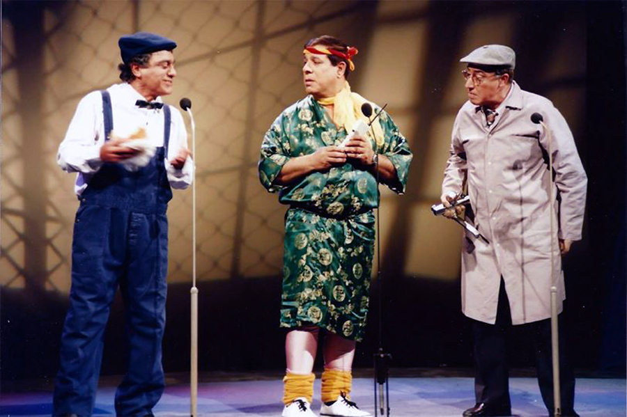 הגשש החיוור בעת הקלטה לטלוויזיה